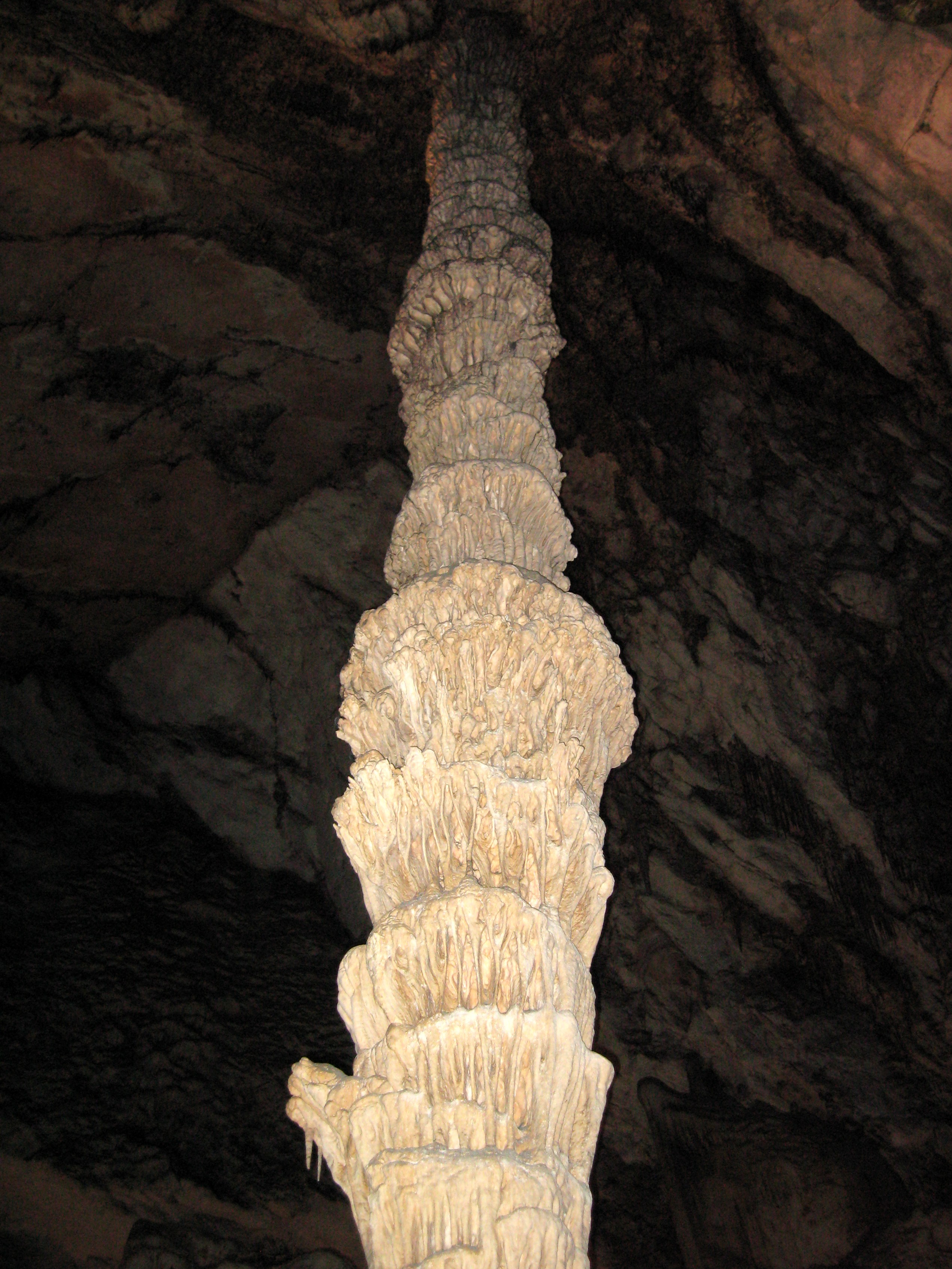 „Säulenkönigin“, Coves d’Artà, Gemeinde Capdepera, Mallorca, Spanien